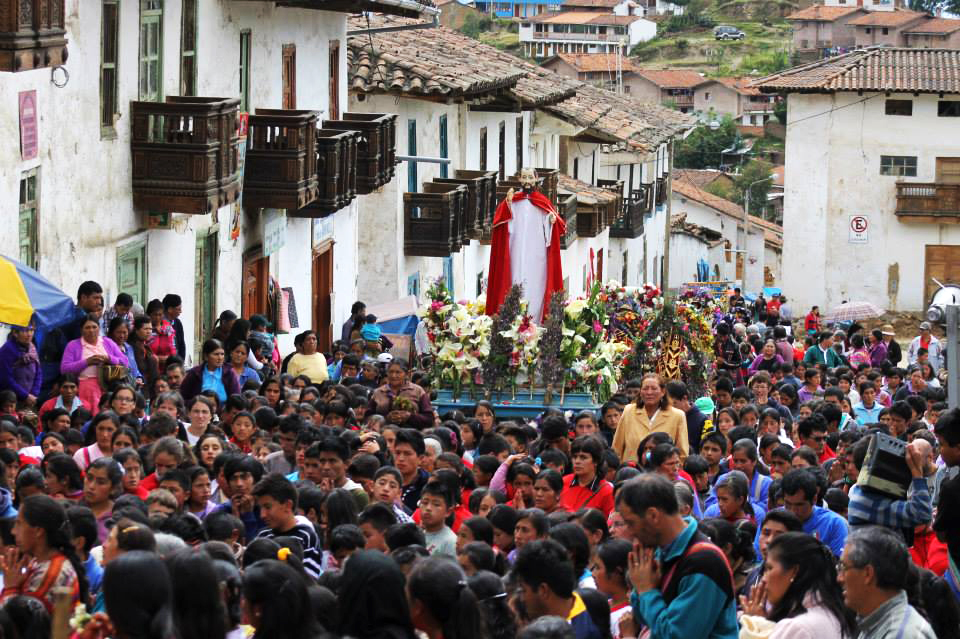 San Martín Papa, patrón de Chacas desde su fundación en 1572. Hasta 1750, su fiesta patronal se celebraba desde el 13 al 16 de abril, por lo que, durante casi 200 años, este santo patrón recorría las calles de Chacas en dos procesiones. Actualmente sólo se mantiene su última procesión durante el día de Corpus Christi.